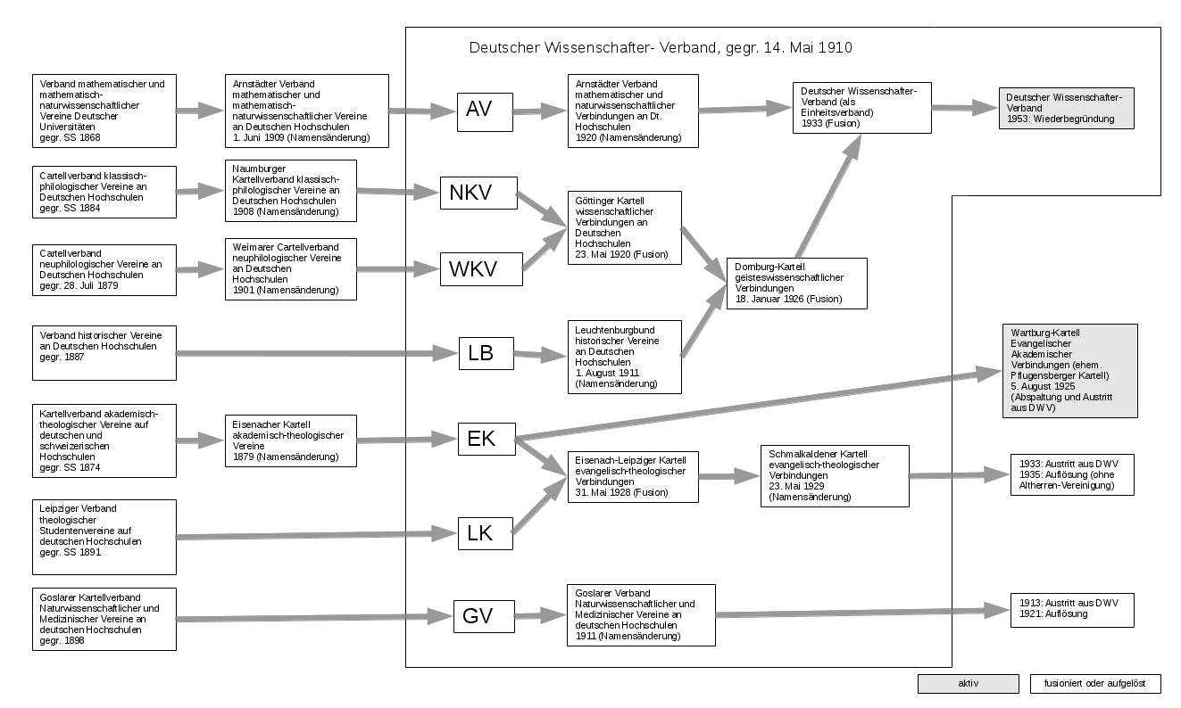 Schaubild der Verbandsgeschichte des Deutschen Wissenschafter-Verbands